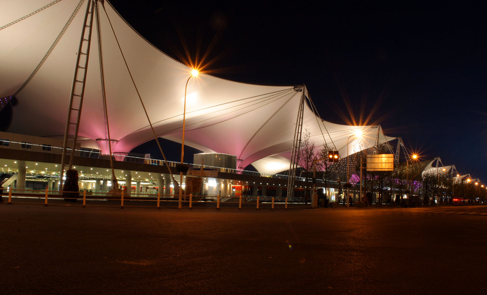 Expo Axis